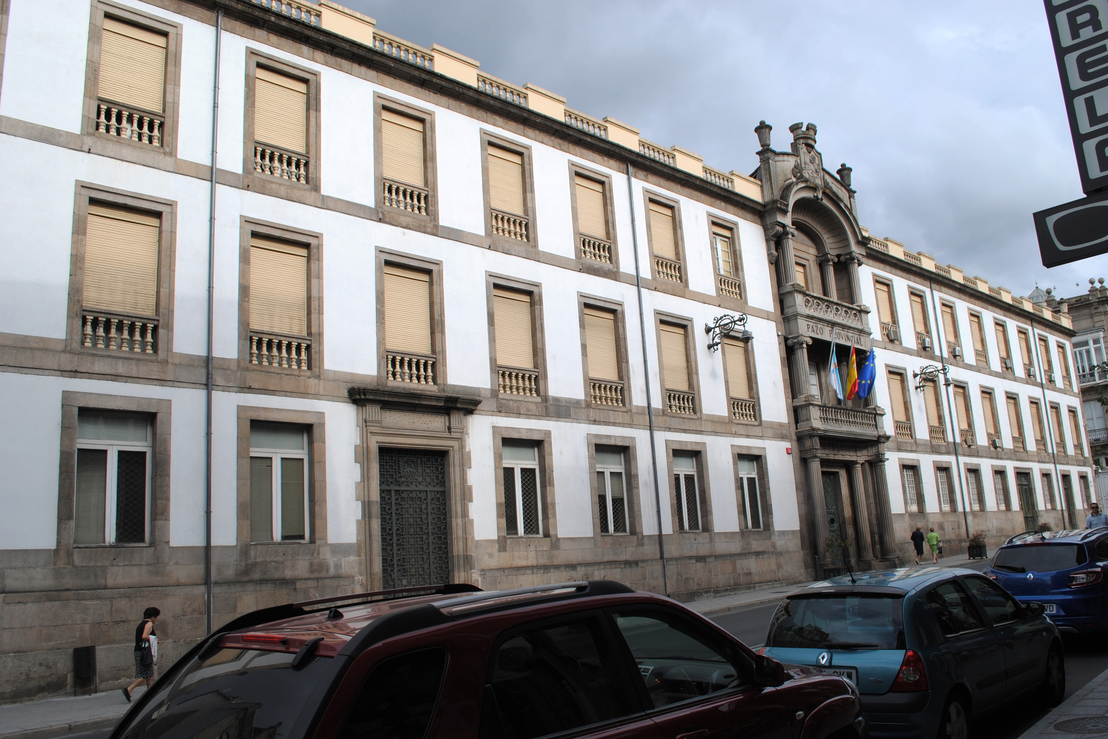 see title